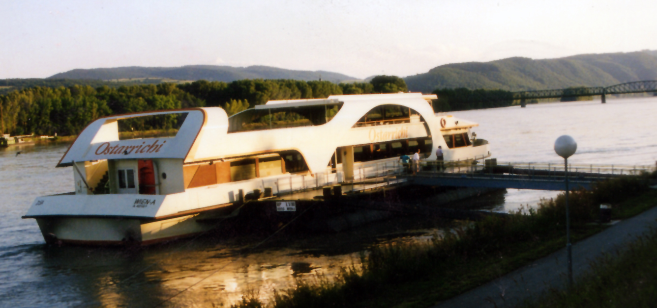 Donauschiff MS "Ostarrichi" in Krems an der Donau